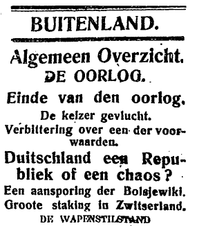 Kop van Het Centrum 11/11/1918 Afkomstig van over te nemen "ter toelichting bij het onderwijs". Wikipedia lijkt me educatief genoeg. Het auteursrecht van deze niet op naam gestelde publicatie van meer dan 70 jaar geleden is volgens mij sowieso toch verlopen.